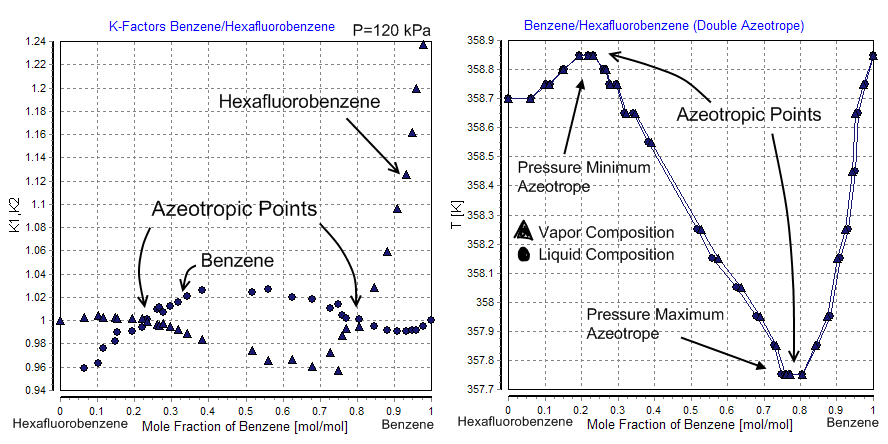 Benzene-Hexafluorobenzene (Double Azeotrope)